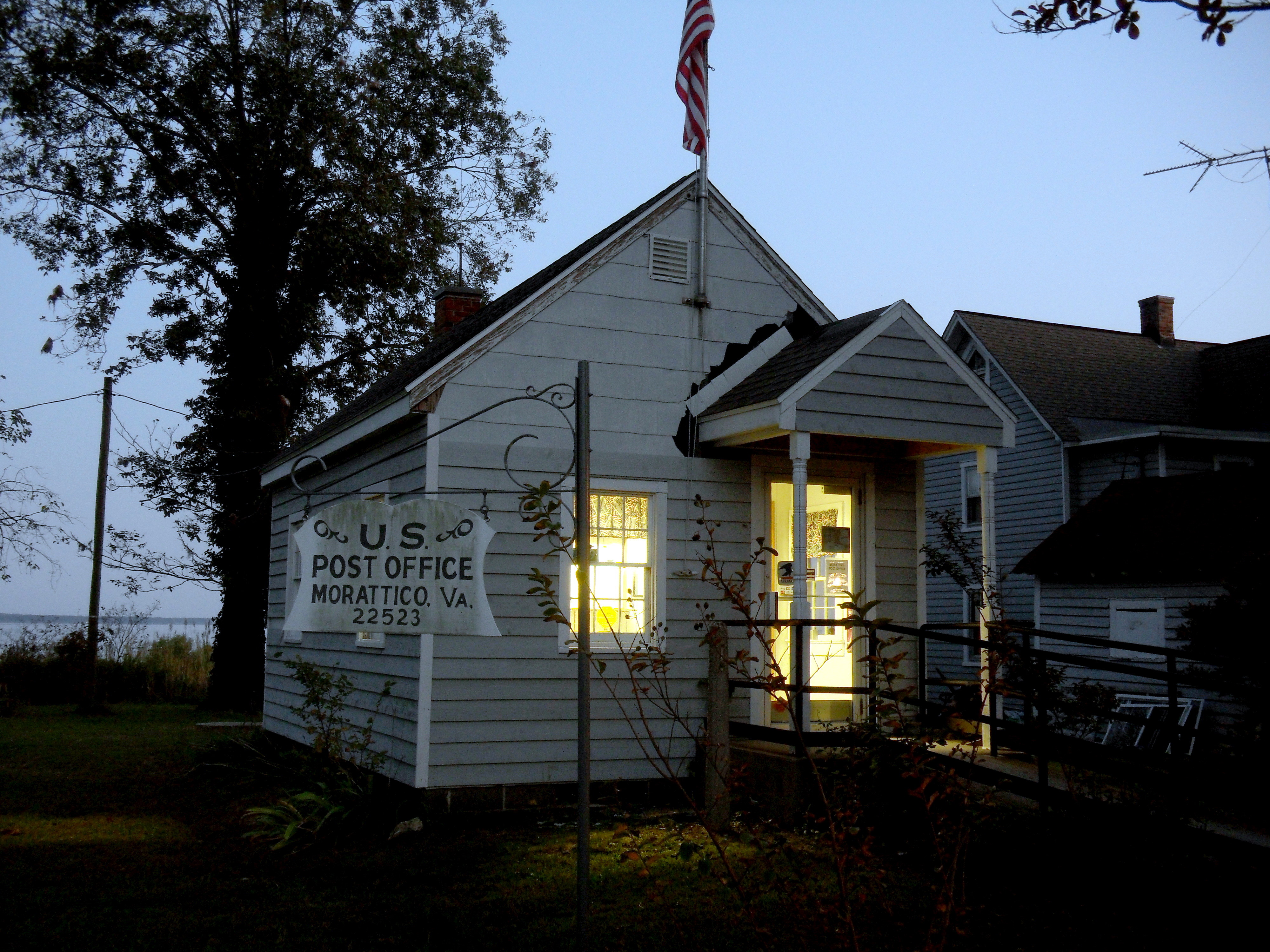 US Post Office, Morattico, VA